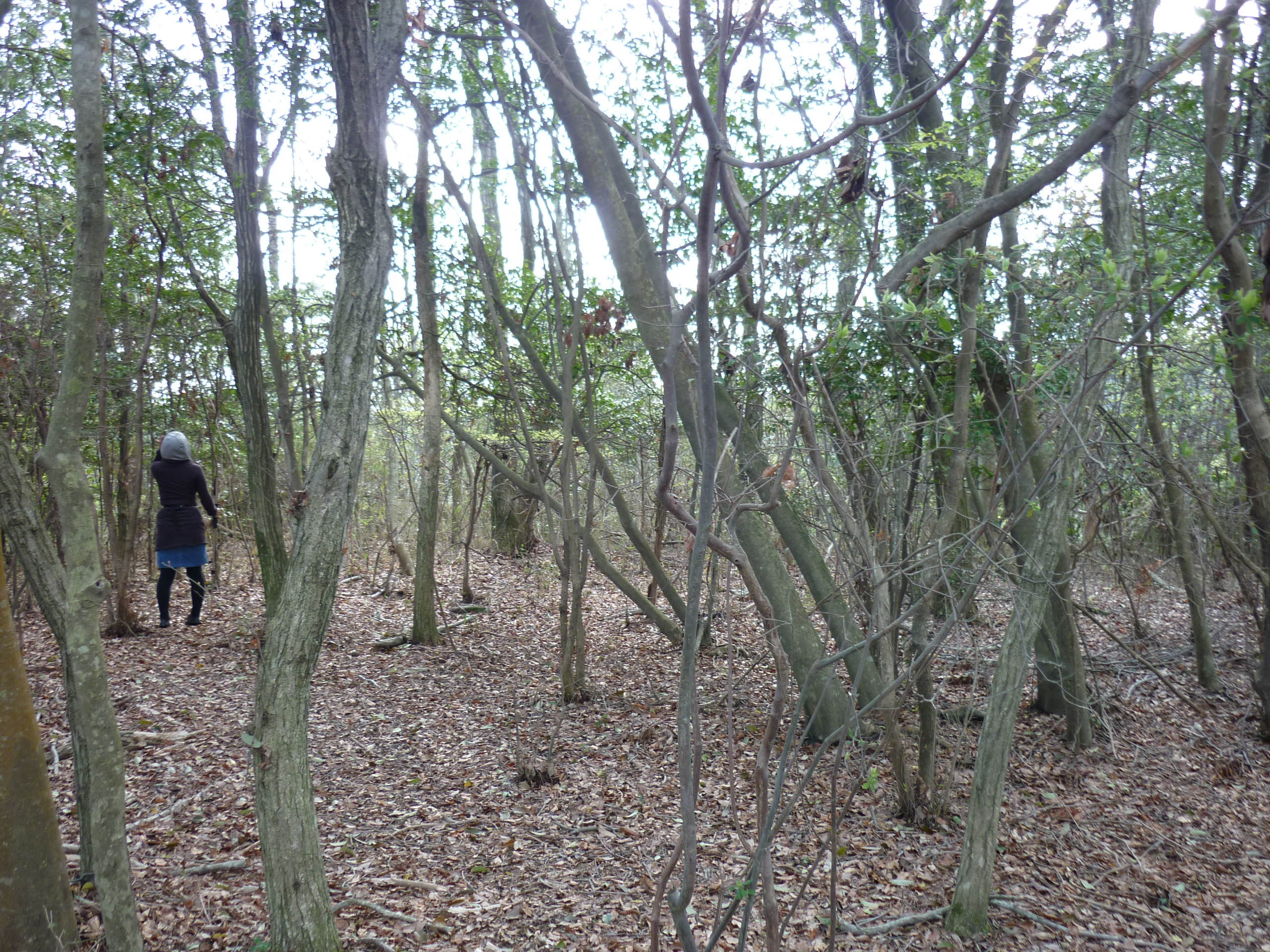 三の丸